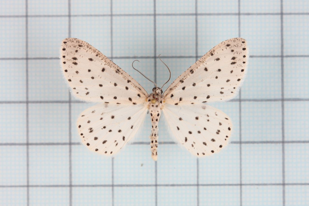 Xenoplia trivialis (Yazaki) 胡麻斑星尺蛾 鞍1:P.33,Pl.7-14 臺灣尺蛾科圖鑑 2 P.128 male